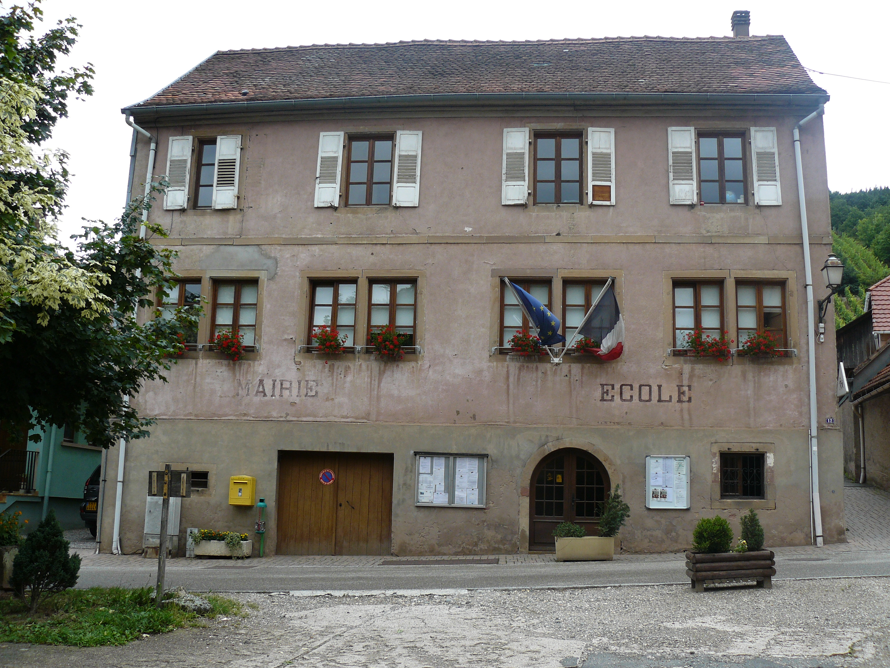 Mairie de Bernardvillé (1848)